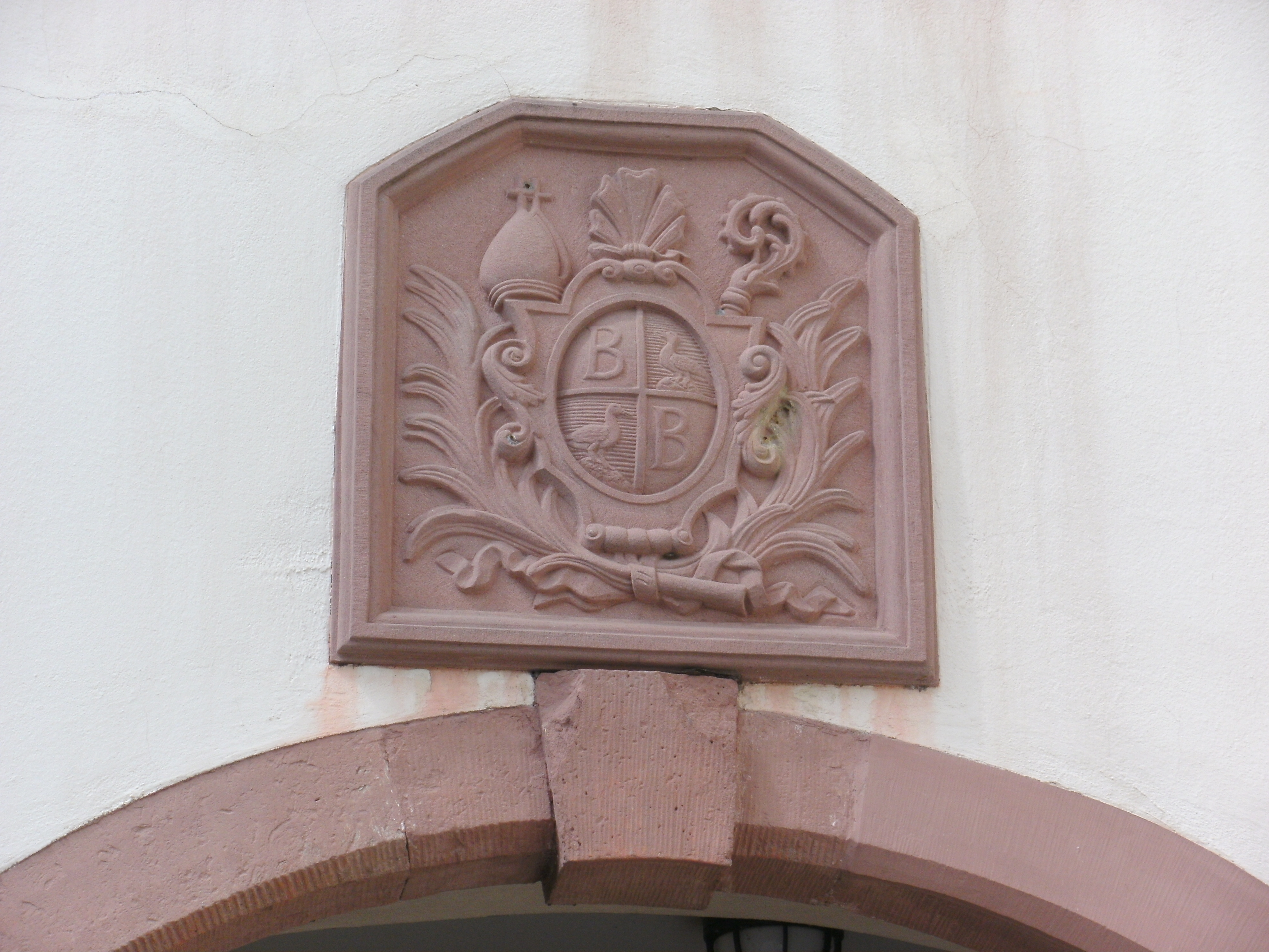 Ehemaliges Prämonstratenser-Kloster Himmelspforte in Grenzach-Wyhlen, Teilort Wyhlen. Wappen am früheren Klostertor. Es handelt sich um das Wappen des Abtes Jean Baptiste Sémon von Bellelay und Himmelspforte. Im ersten und vierten Feld ist das schwarze B auf silbernem Grund zu sehen - das Wappen der Abtei Bellelay im Berner Jura. Im zweiten und dritten Feld ist die Martinsgans zu sehen, das Wappentier des persönlichen Wappens des Abtes.